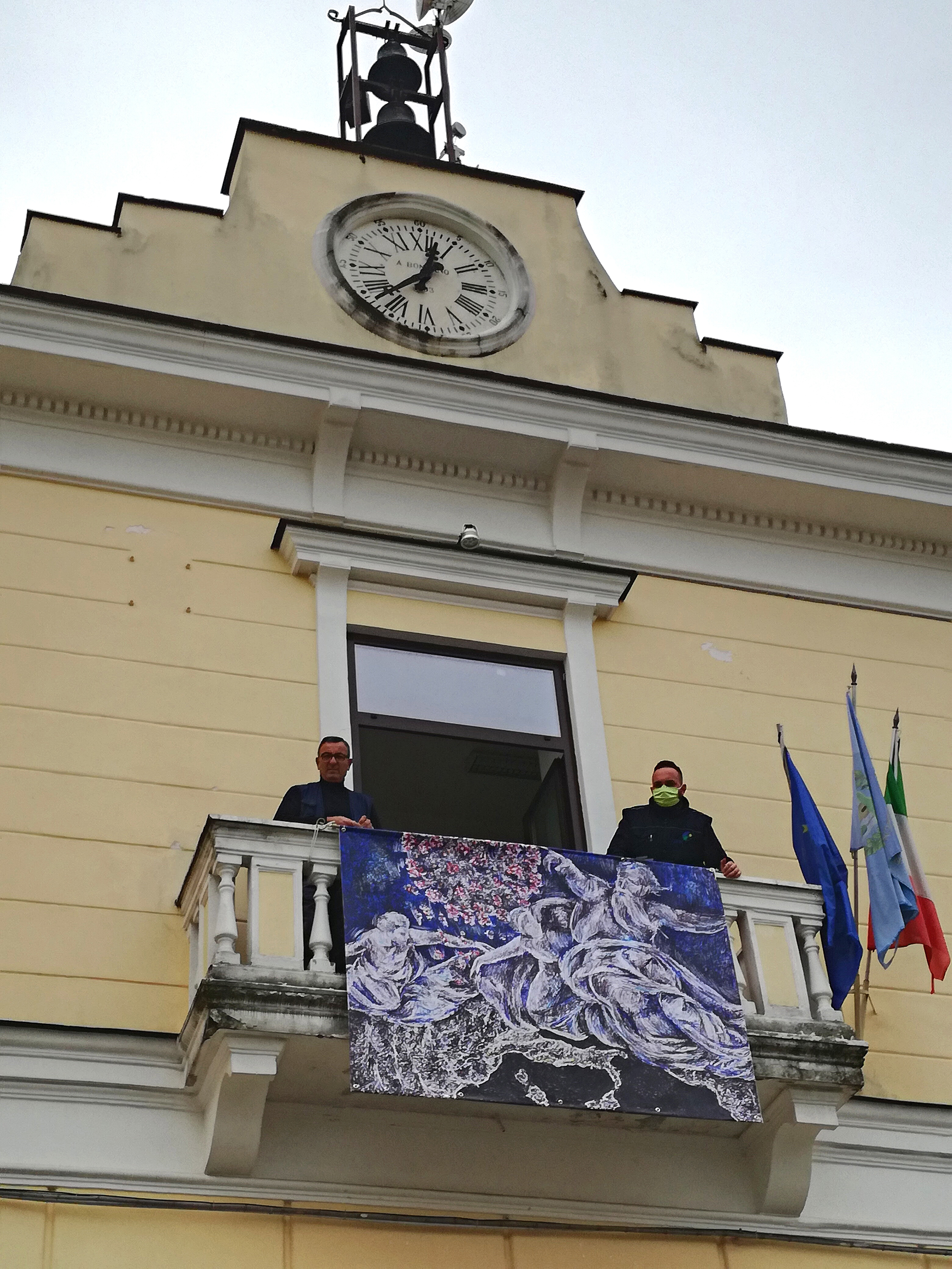 L'opera "E guarirai da tutte le malattie.. ed io, avrò cura di te" (Dio smaterializza la struttura molecolare del Coronavirus Covid-19 sul mondo) dell'artista Giovanni Guida, diventata virale in tutto il mondo, campeggia sulla balaustra in pietra della facciata del Comune di Cesa (Caserta). L'augurio del Sindaco, avv. Enzo Guida, e dell'Amministrazione Comunale all'umanità per sconfiggere la pandemia e riscoprire il valore della comunità; un segno di speranza e conforto per l'avvio della fase 2 Coronavirus.